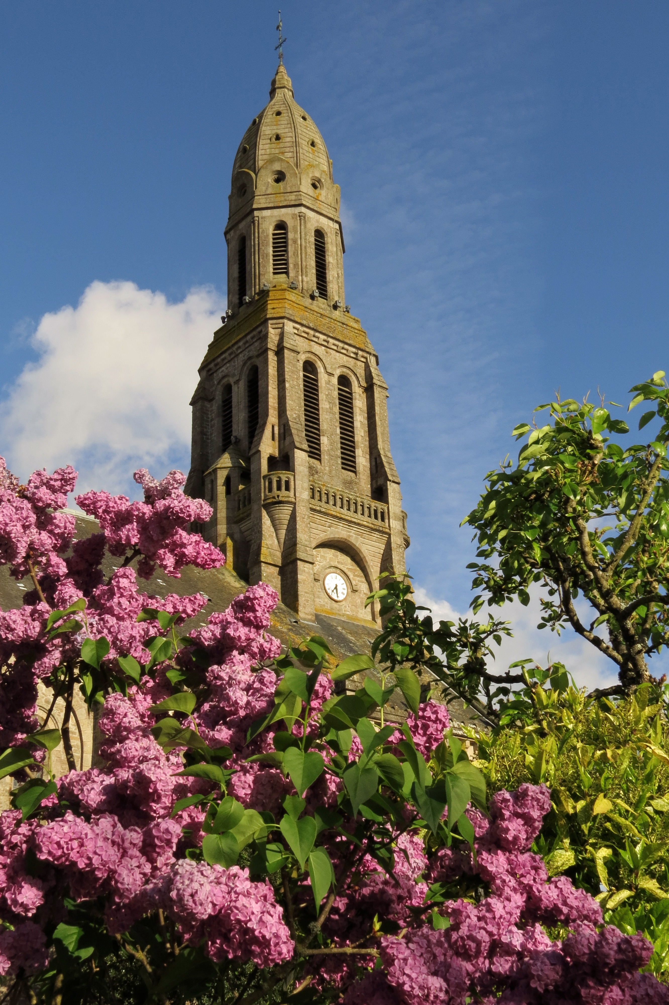 Eglise de Chambretaud (Fleurs au 1er plan)